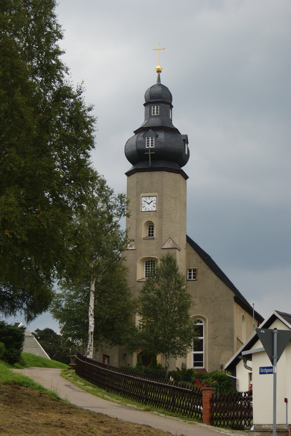 Kirche Kühnhaide